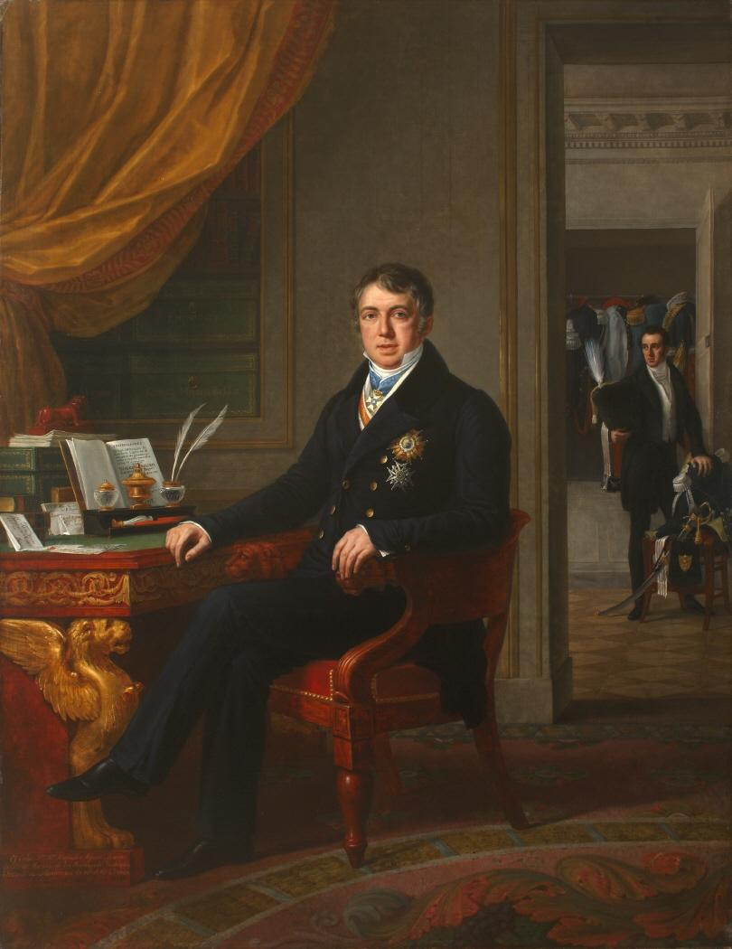 Retrato del político y banquero español Alejandro María Aguado (1782-1842), primer marqués de las Marismas del Guadalquivir.